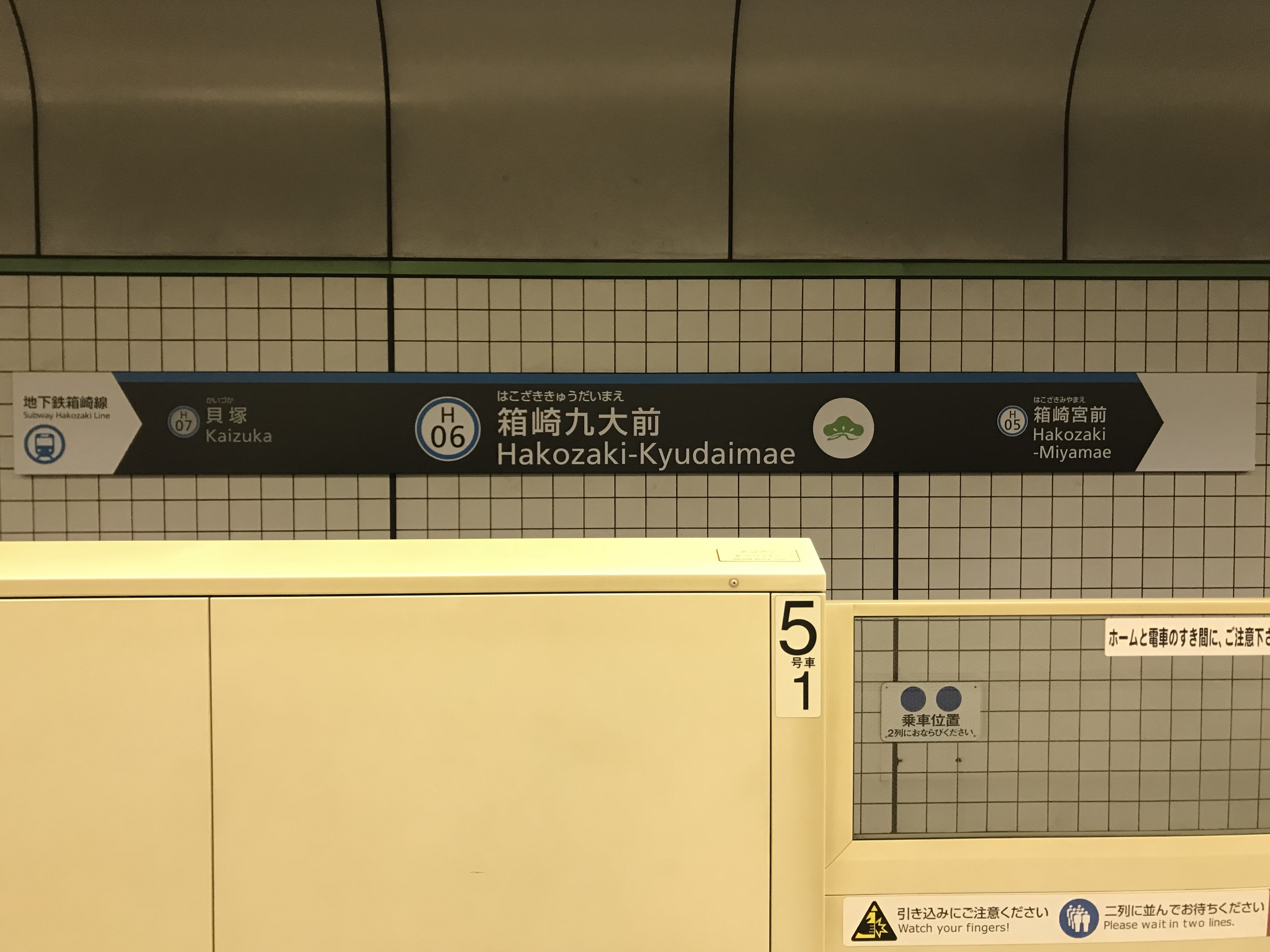 箱崎九大前駅の駅名標。イラストは九州大学の「九」にマツ